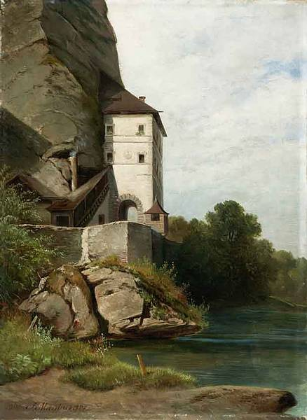 Das Klausentor in Salzburg von der StadtseiteThe Klausen-Gate of Salzburg from the city sidelabel QS:Lde,"Das Klausentor in Salzburg von der Stadtseite"label QS:Len,"The Klausen-Gate of Salzburg from the city side"